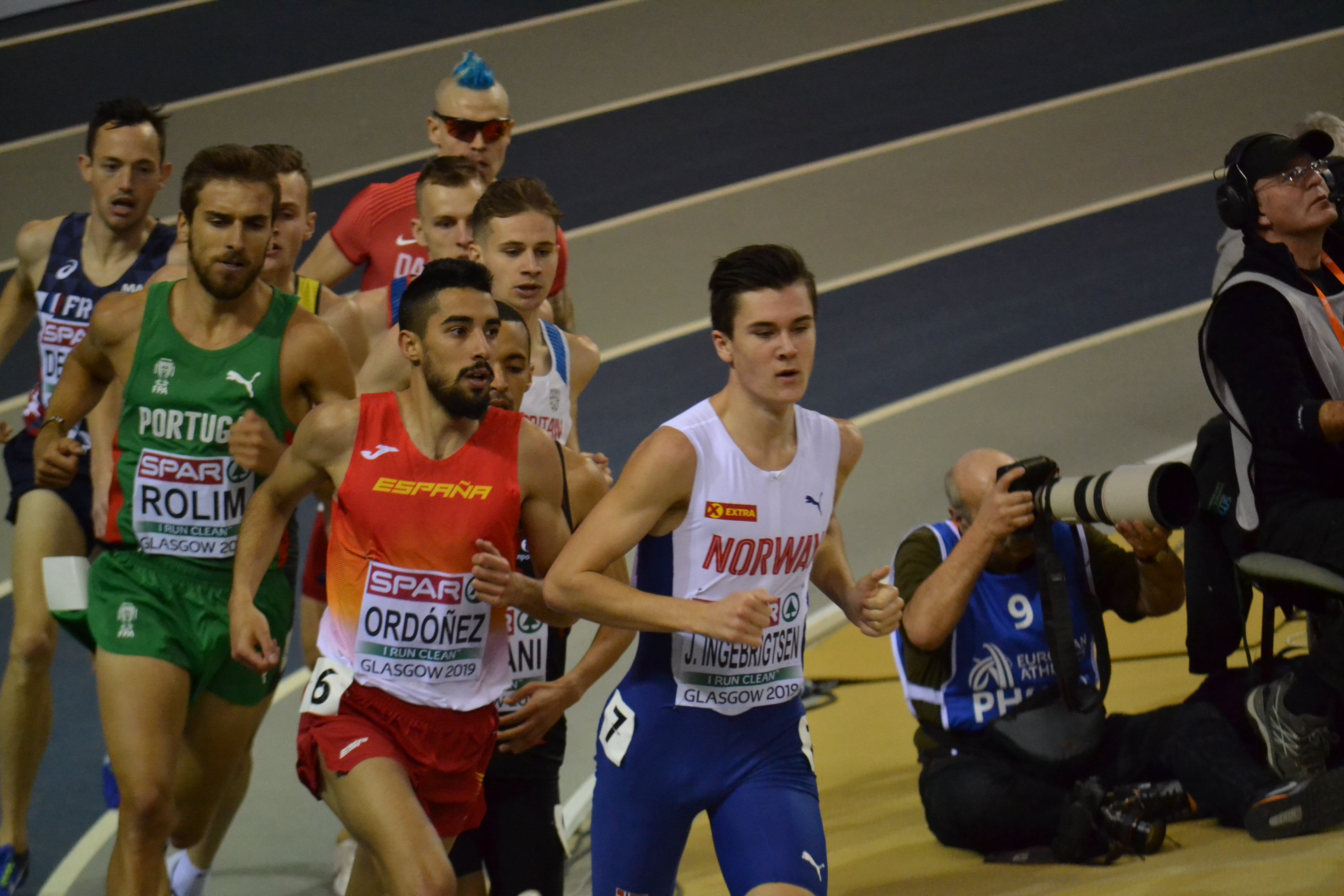 Mens 1500m